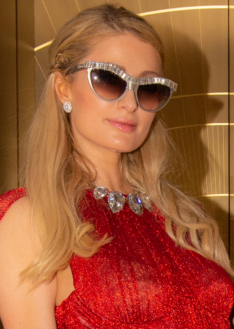 Paris Hilton en compagnie de Caroline Stanbury et Angela Donava à L'hôtel de Paris Monaco photographiées par Gil Zetbase